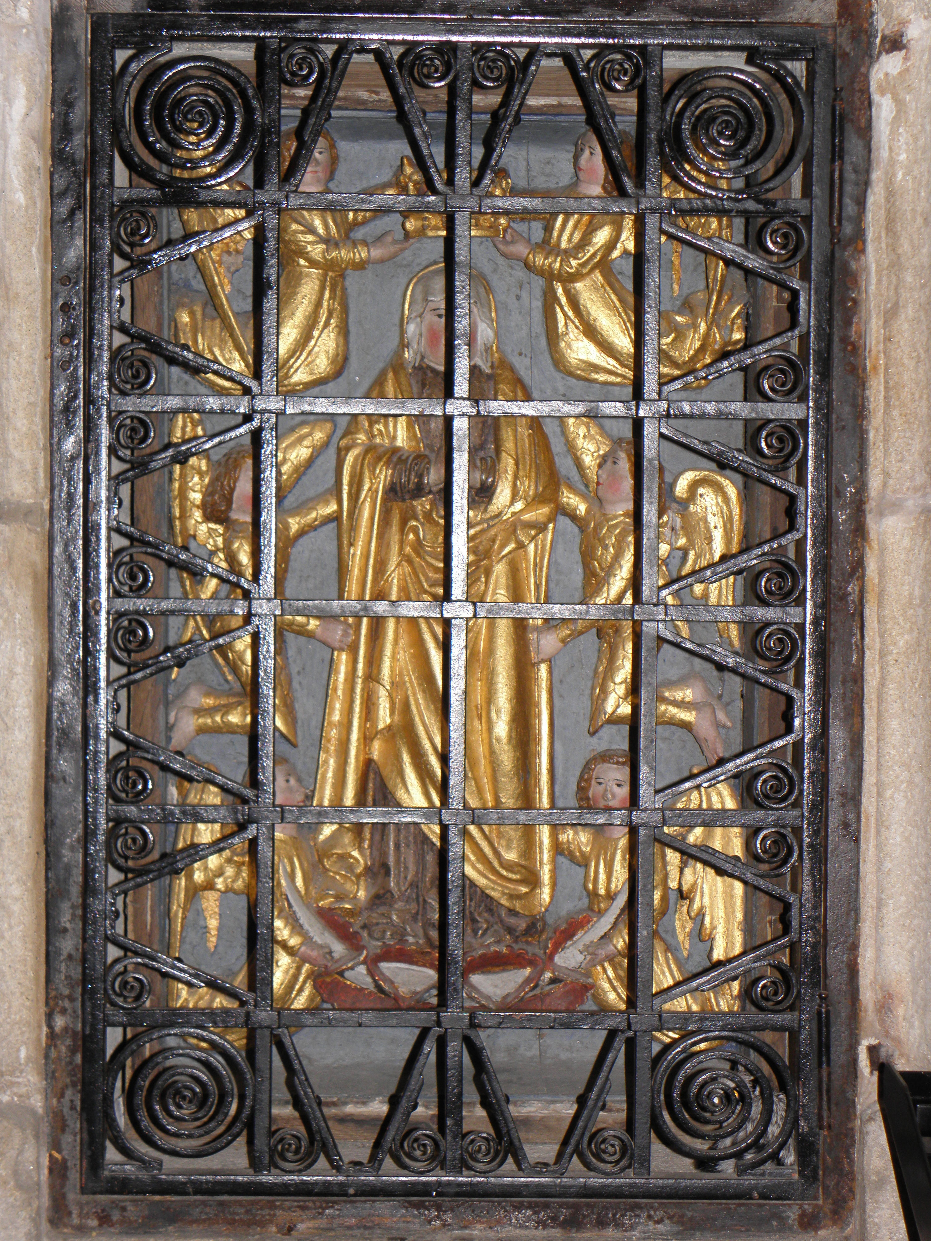 Bas-relief de Notre-Dame-des-Vertus en la Basilique Saint-Sauveur de Dinan (22).